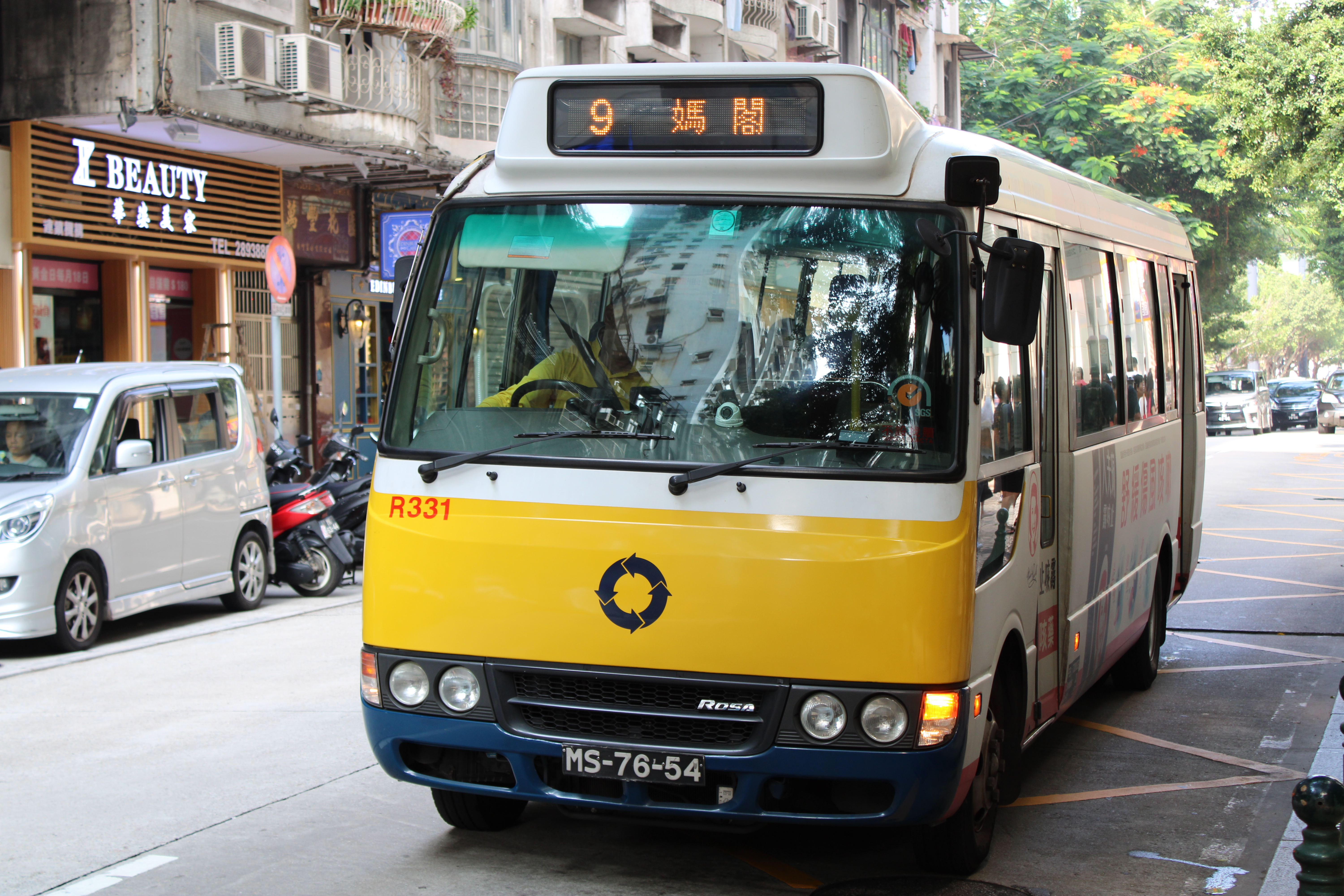 新福利三菱Rosa小巴行駛9路線。